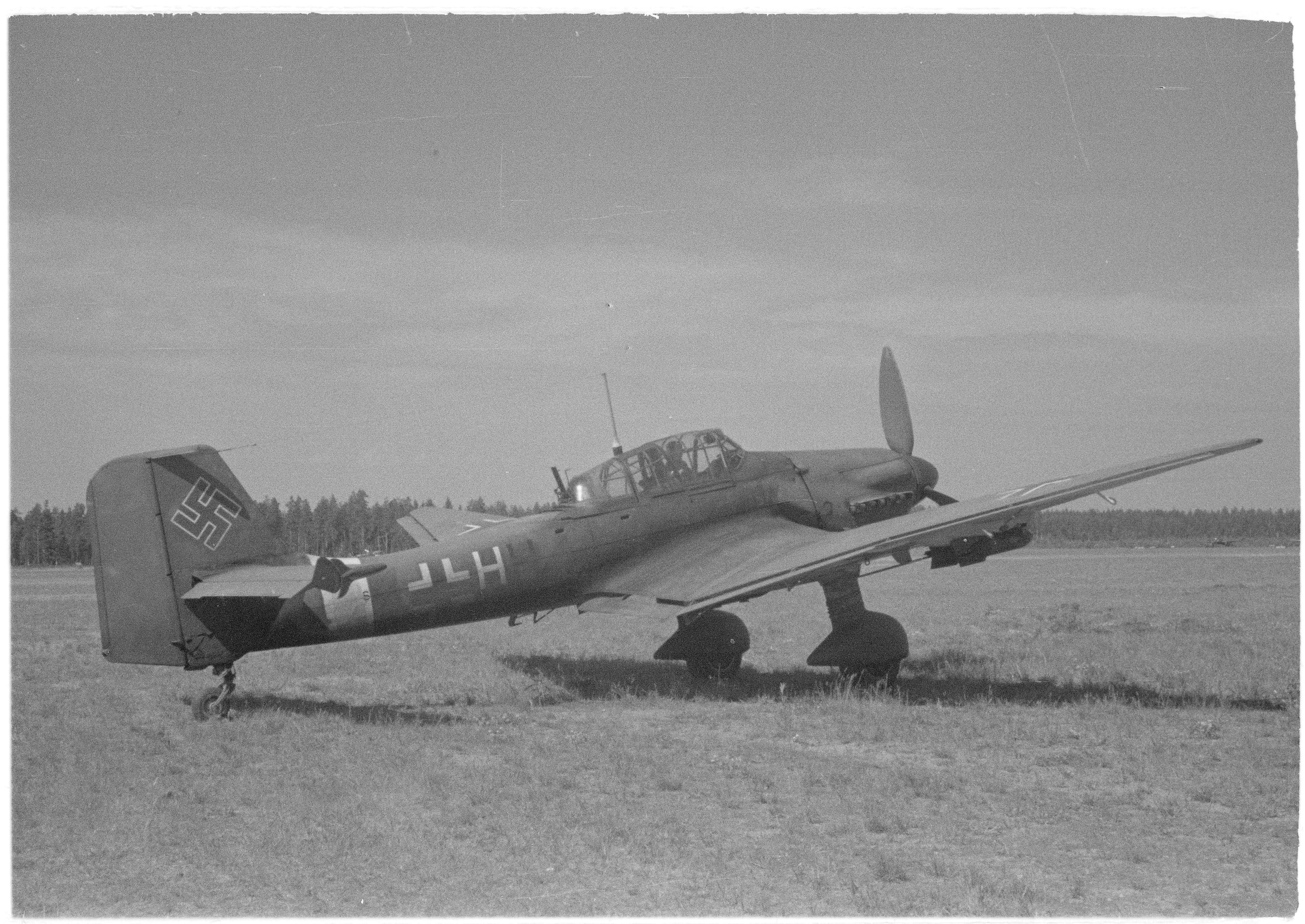 Stuka-syöksypommittaja. (Kuvassa on saksalaisen 1./SG 3:n Junkers Ju 87 D-5, tunnus S7+HH). Kuvauspaikka: Immolan lentokenttä